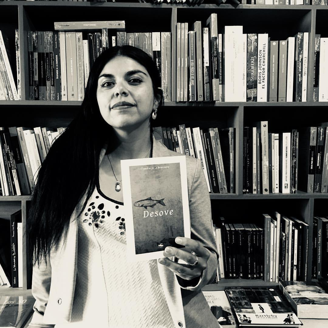 Escritora junto a su obra "Desove".